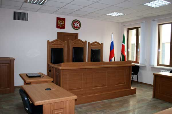 Фотографии Верховного Суда РТ. Зал рассмотрения гражданских дел.